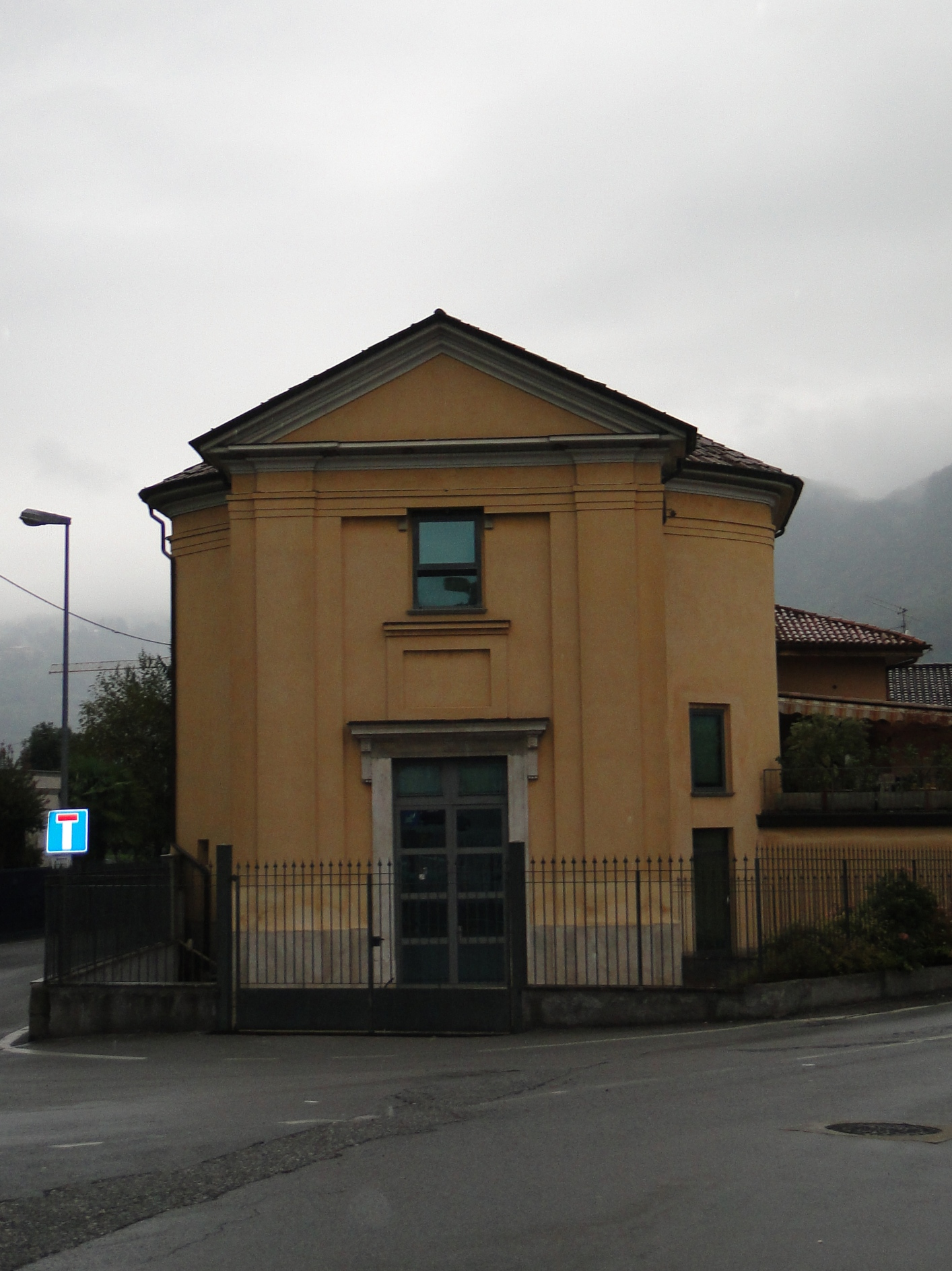 Comenduno di Albino (BG), ex chiesa parrocchiale (ora sconsacrata) di sant'Alessandro